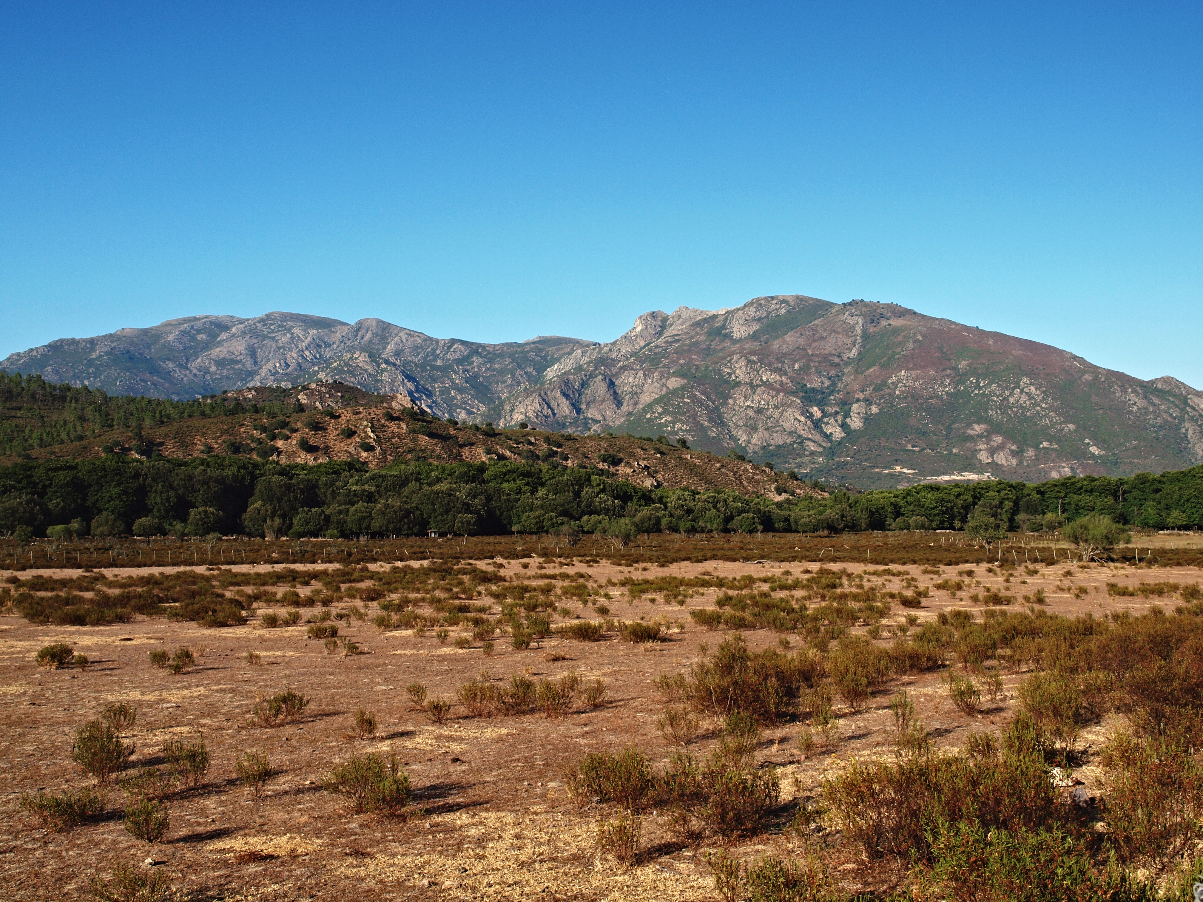 Moltifao (Corsica) - Plaine de Campo Longo derrière laquelle coule l'Asco